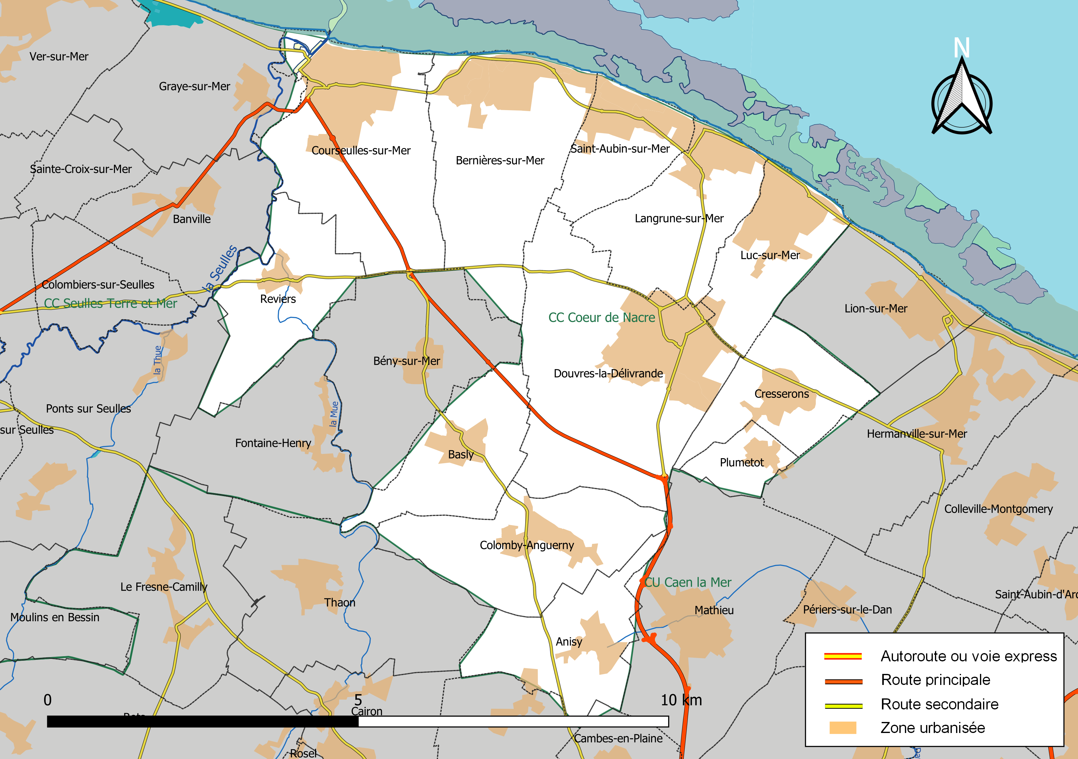 Carte géographique de la Communauté de communes Cœur de Nacre, département du Calvados, France. Composition au 1er janvier 2019.